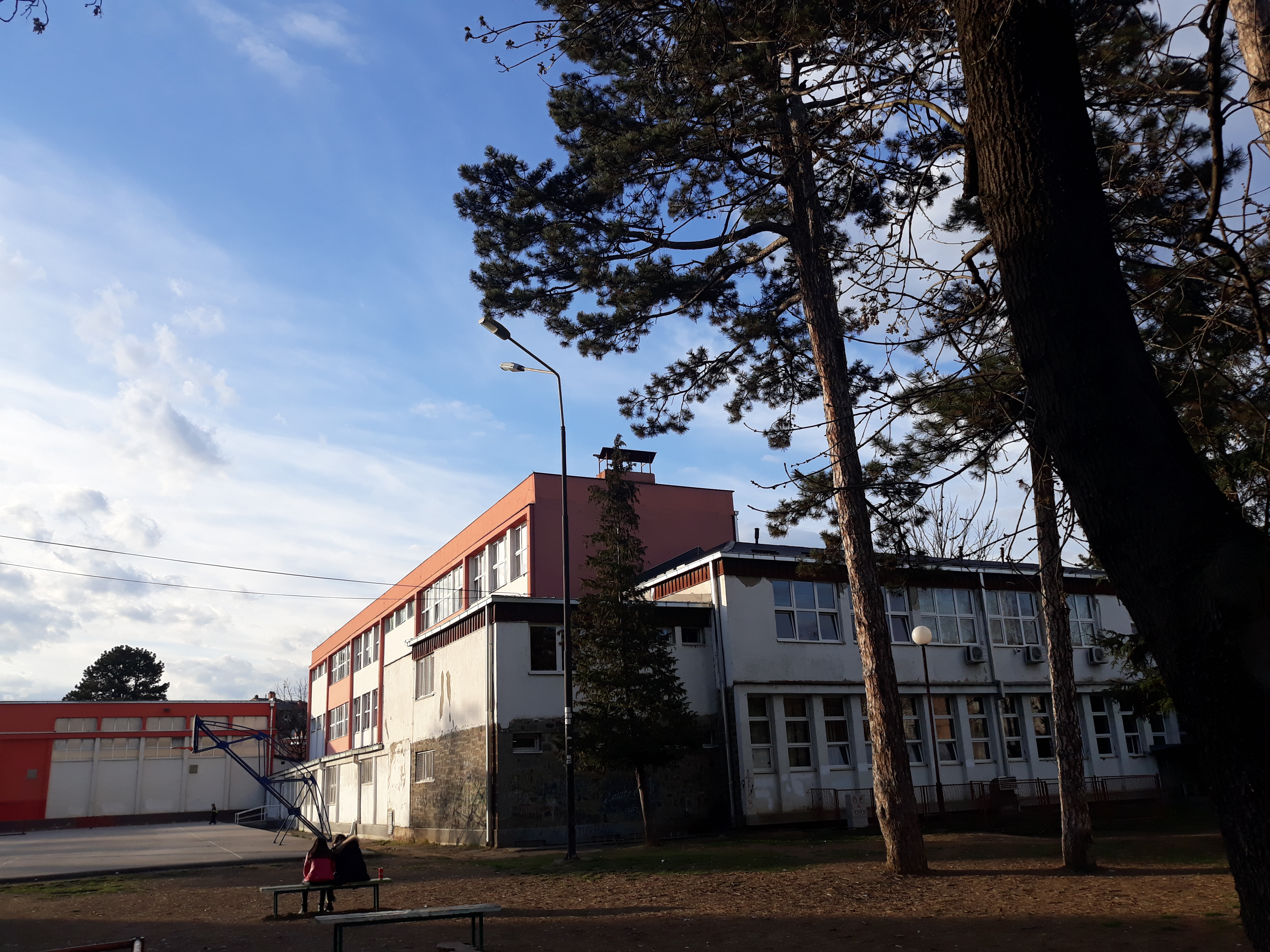 Зграда основне школе „Светозар Марковић“ у Краљеву, фотографисана 2019. године.